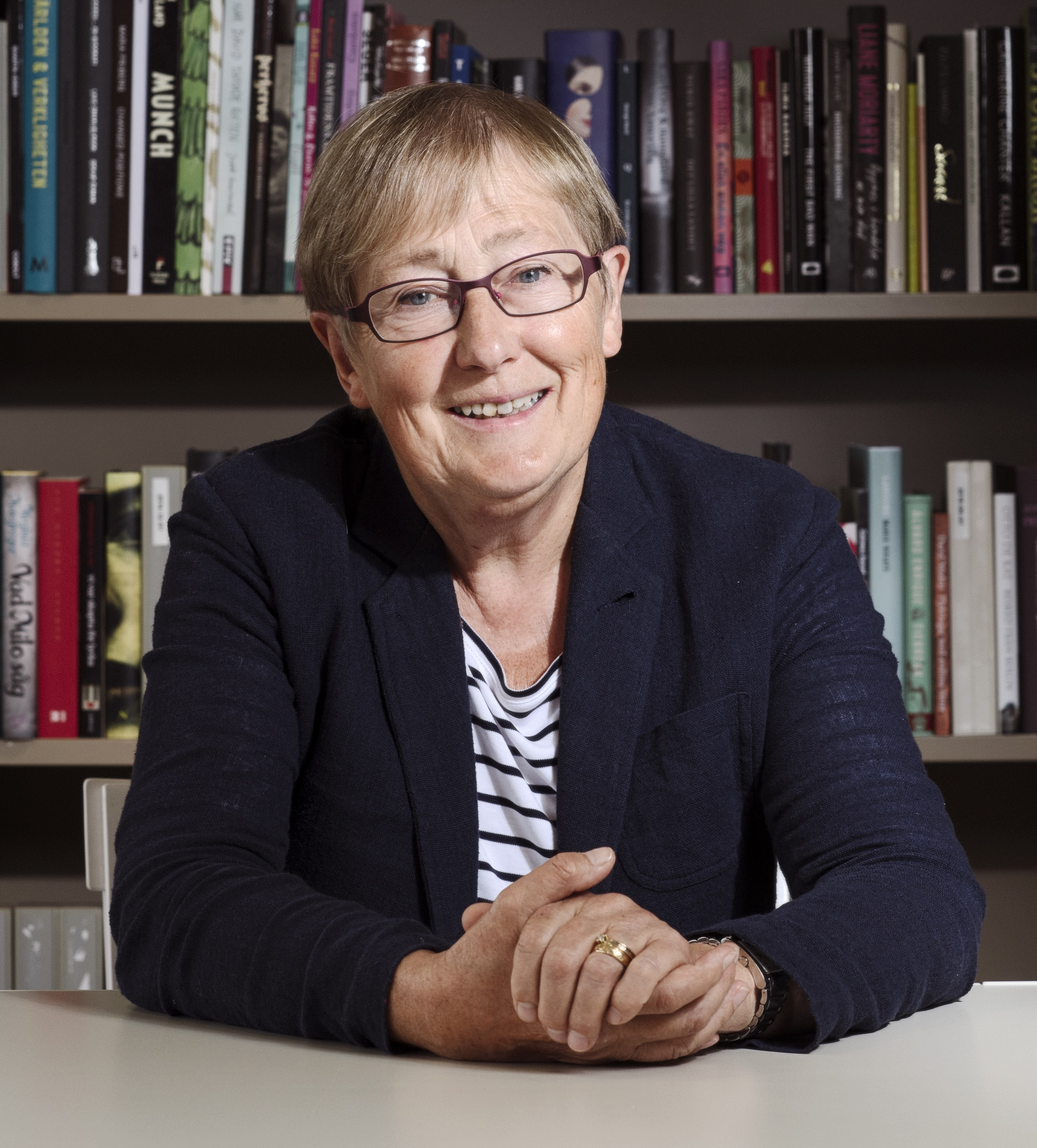 Lena Kåreland, professor emerita i litteraturvetenskap vid Uppsala Universitet.